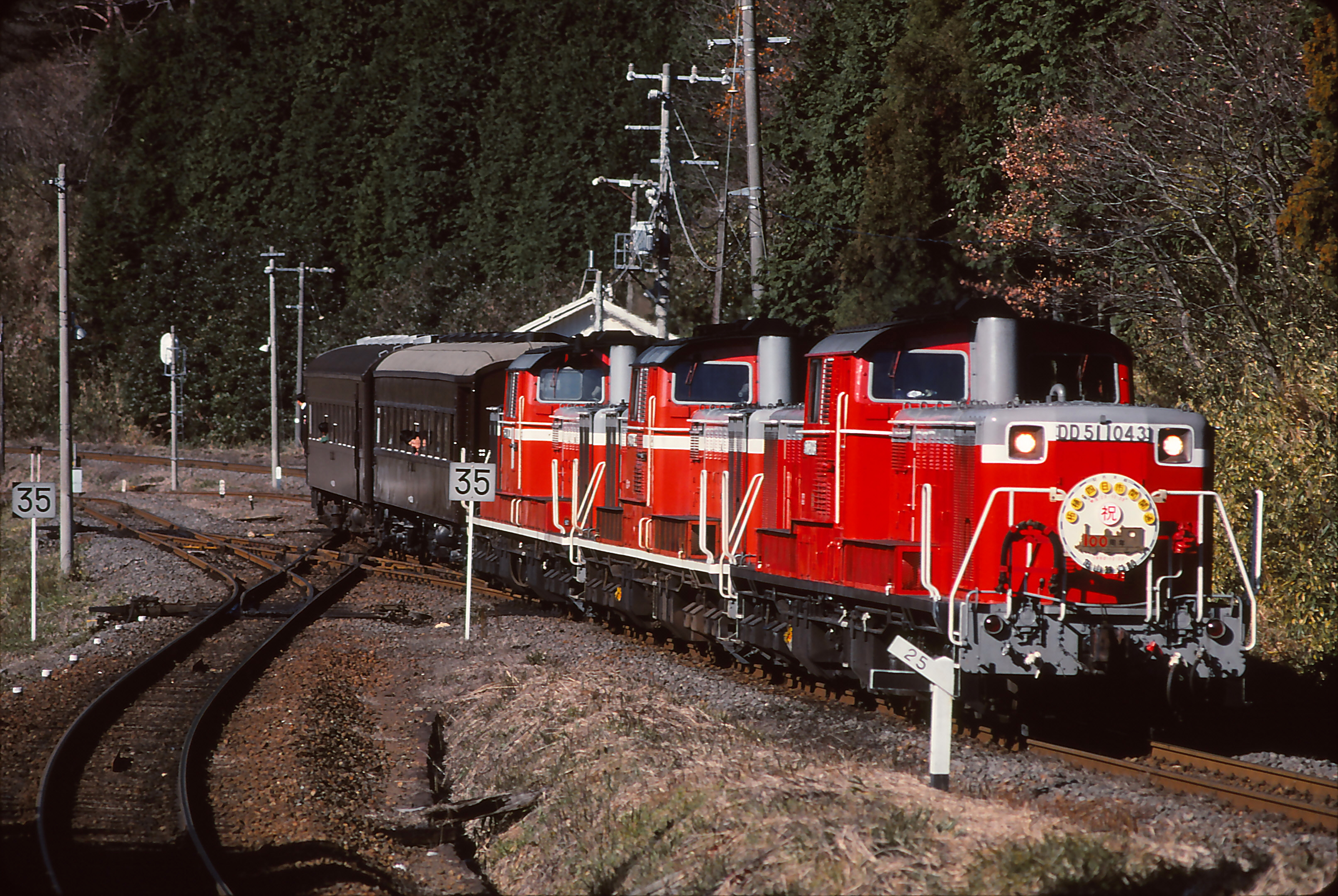 亀山駅開業100周年記念列車 DD51-1043+DD51-1192+DD51-1191 三重県亀山市加太中在家